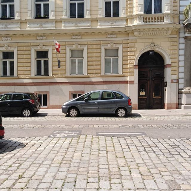 Marokkanergasse 18, Wien. Hier hat Richard Moser bei Kommissar Rex gewohnt.